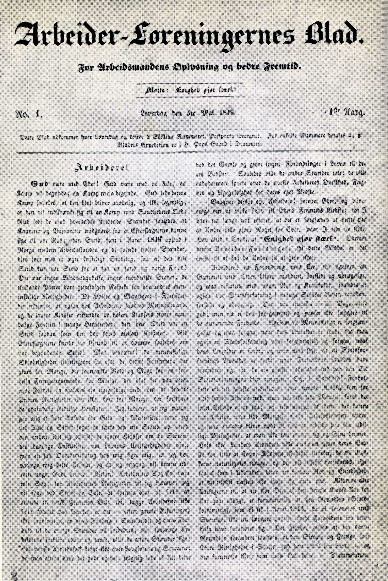 Arbeider-Foreningernes_Blads_første_nummer_1849